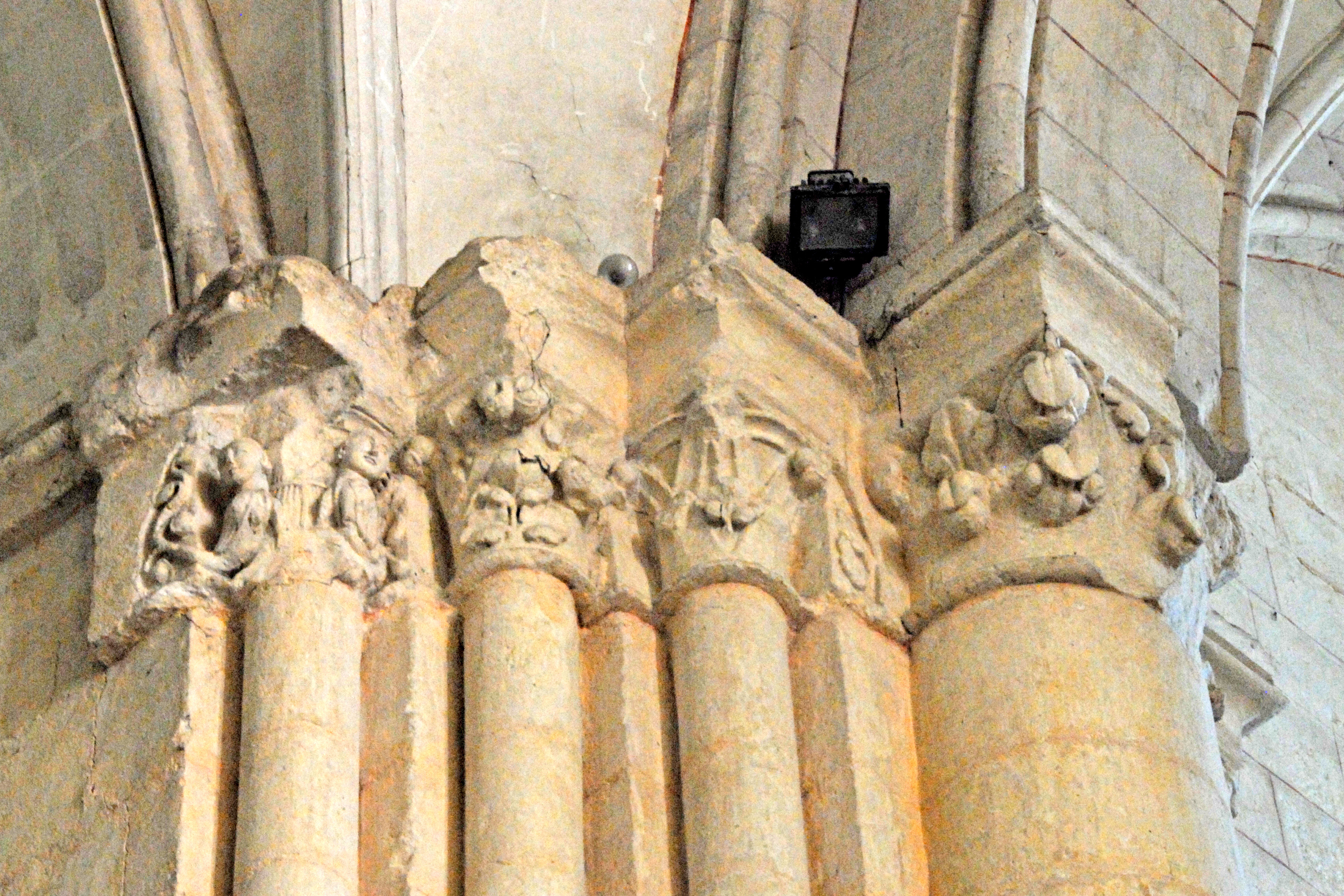 St-Pierre de Pont-l’Abbé-d’Arnoult (17), Pfeilerbündel Vierung / Chor